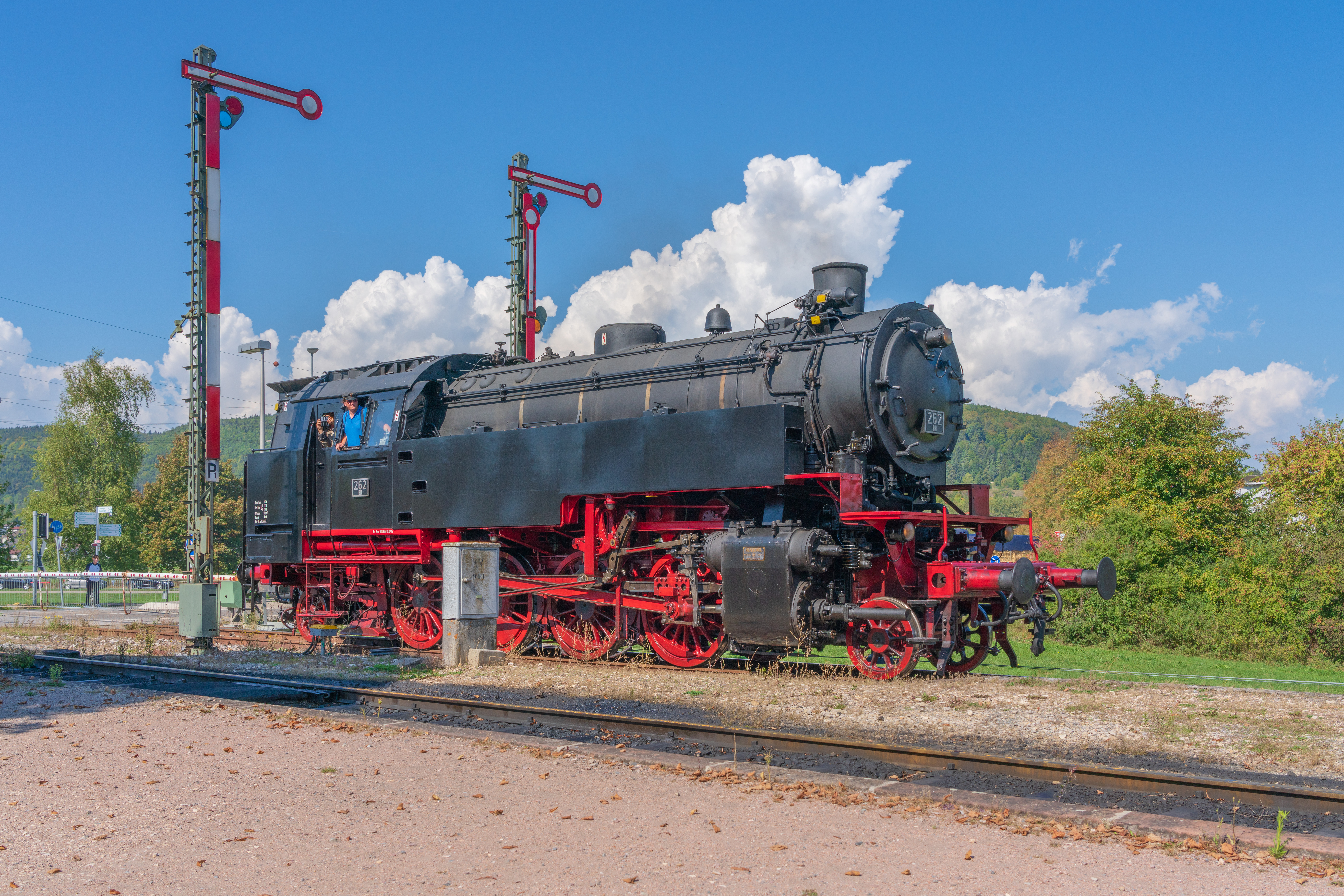 Bahnhof Zollhaus-Blumberg